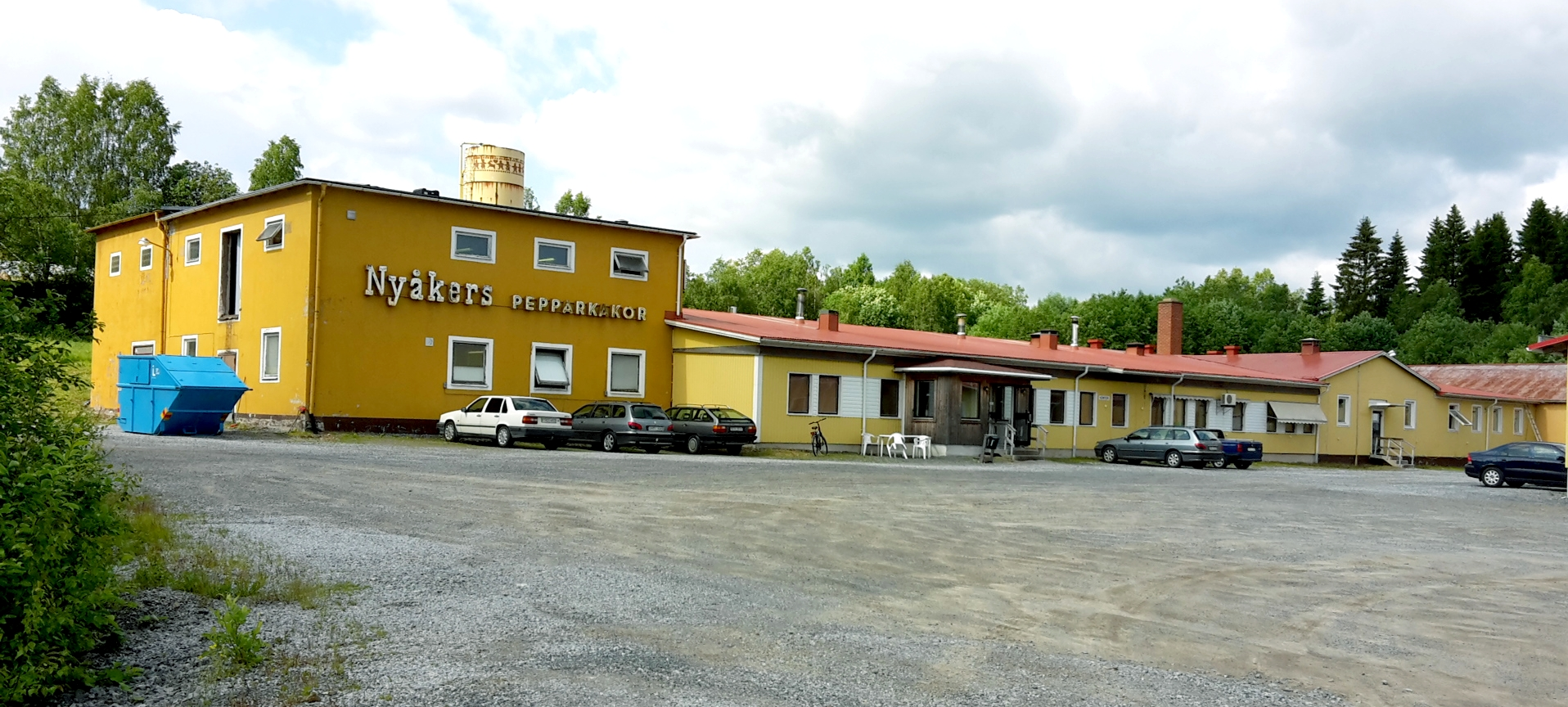 Nyåkers pepparkakor. Den tidigare pepparkaksfabriken, numera filialen.